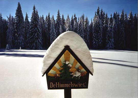 Schild am Flächennaturdenkmal „Himmelswiese“ bei Halbemeile im Winter